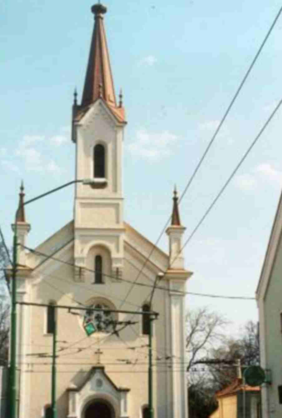 Griechisch-katholische Kathetrale - Kirche der Kreuzerhöhung - in Bratislava